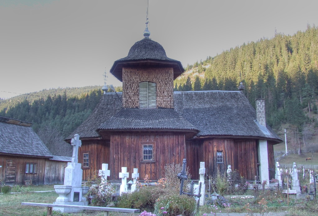 Biserica de lemn din Grinţieş, judeţul Neamţ.